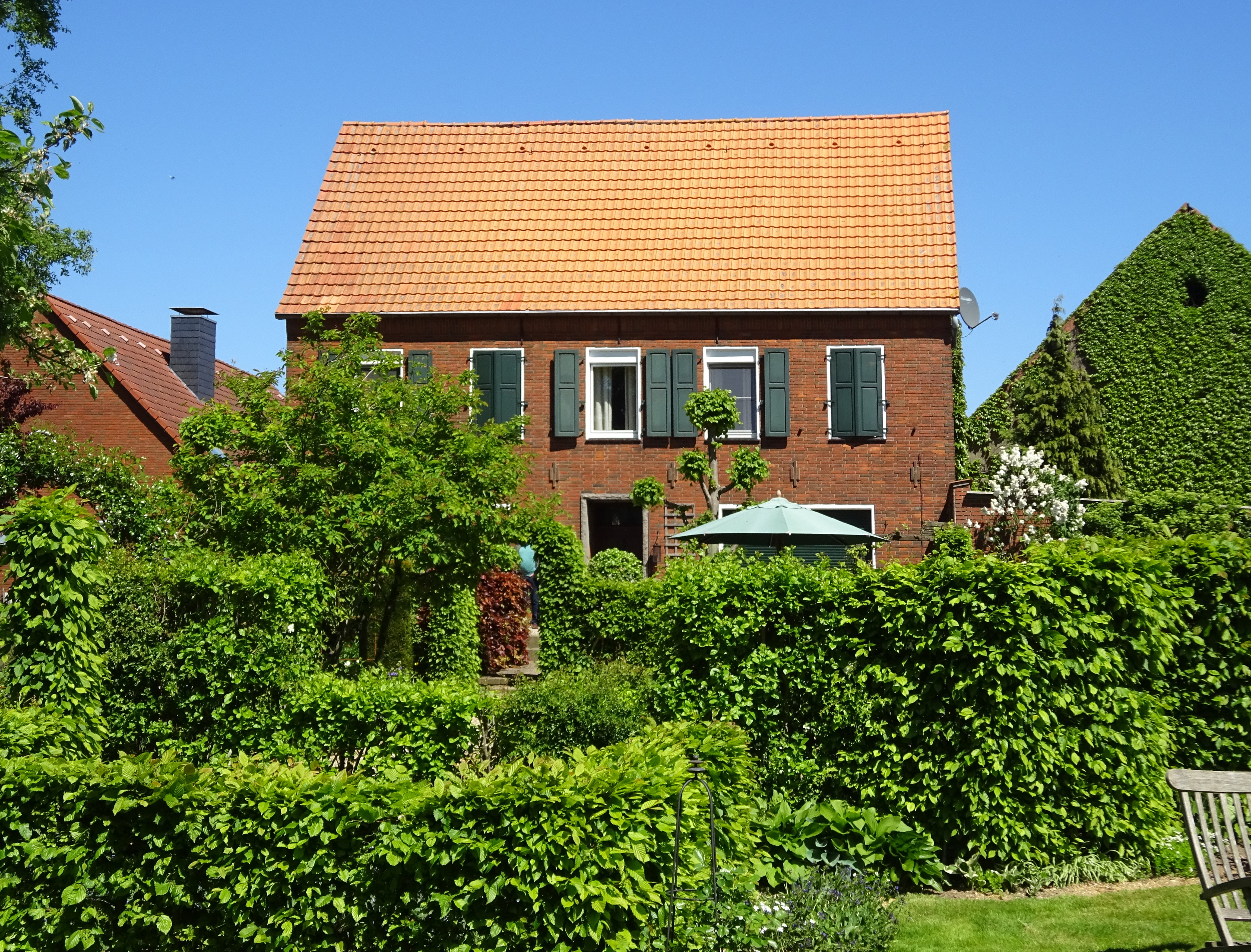 Rees, Grietherort 10, woonhuis en boerderij